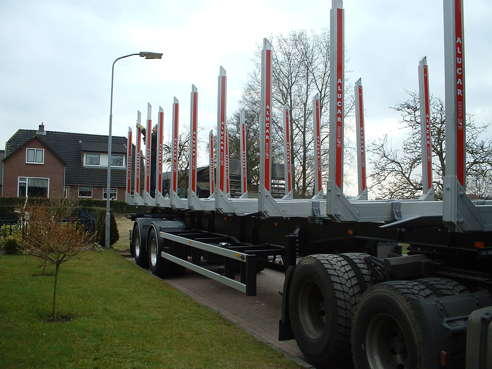 Rongen